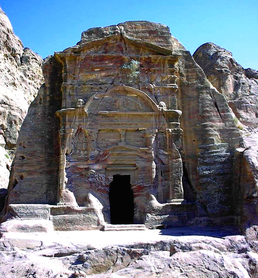 Pétra. Tombe de Sextius Florentinus, gouverneur romain de la Province d'Arabie. IIe siècle. Photo Ginolerhino 2004.